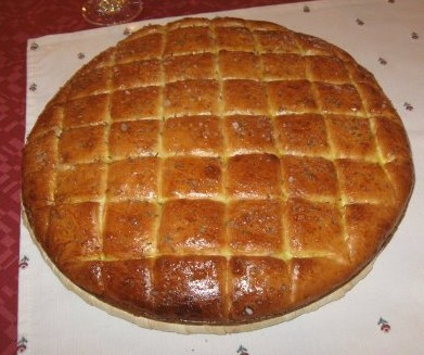 Belokranjska pogača /Slovenian dish